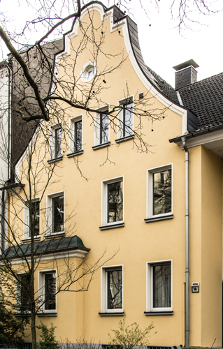 Stolpersteine Dortmund